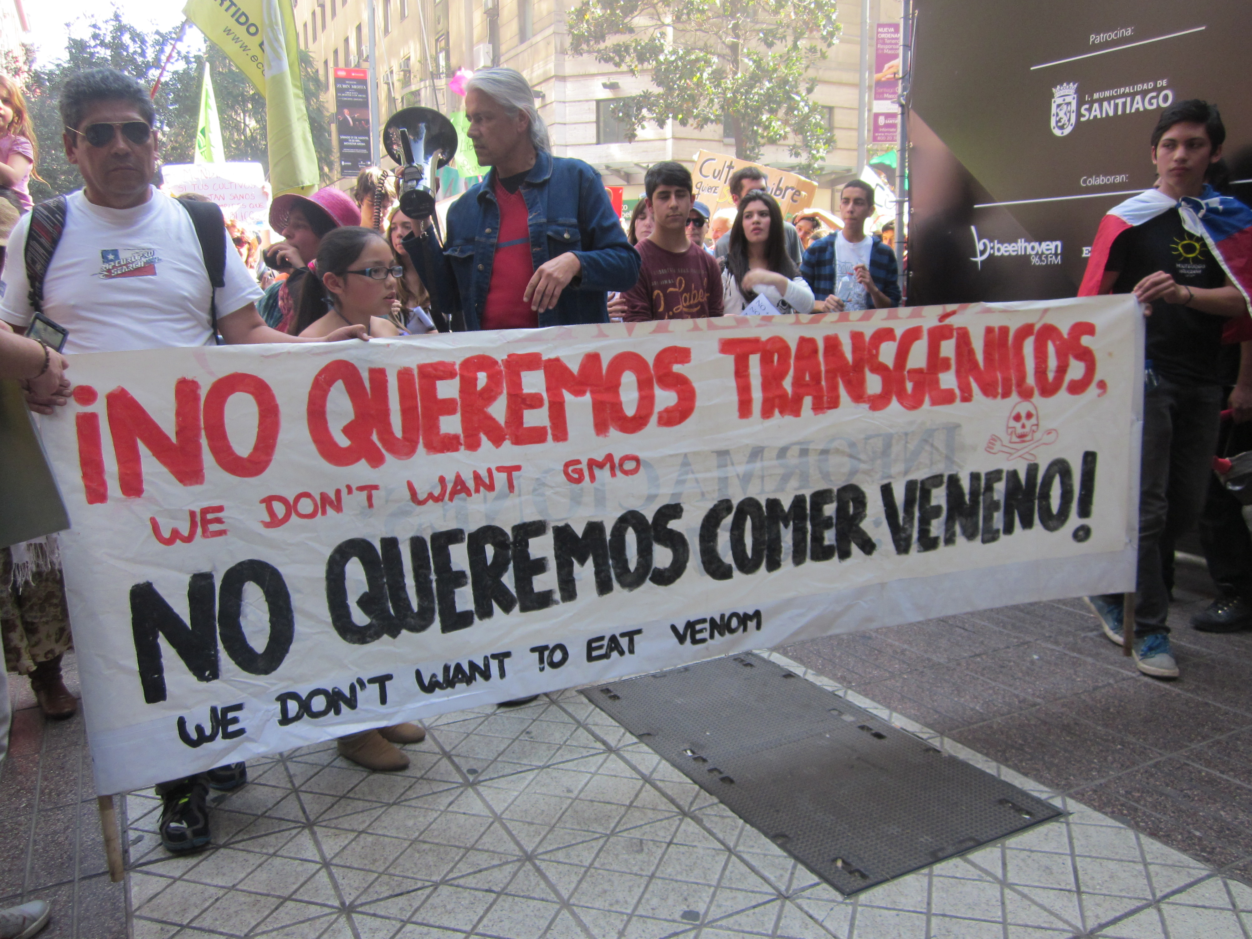 Marcha nacional No a la Ley Monsanto